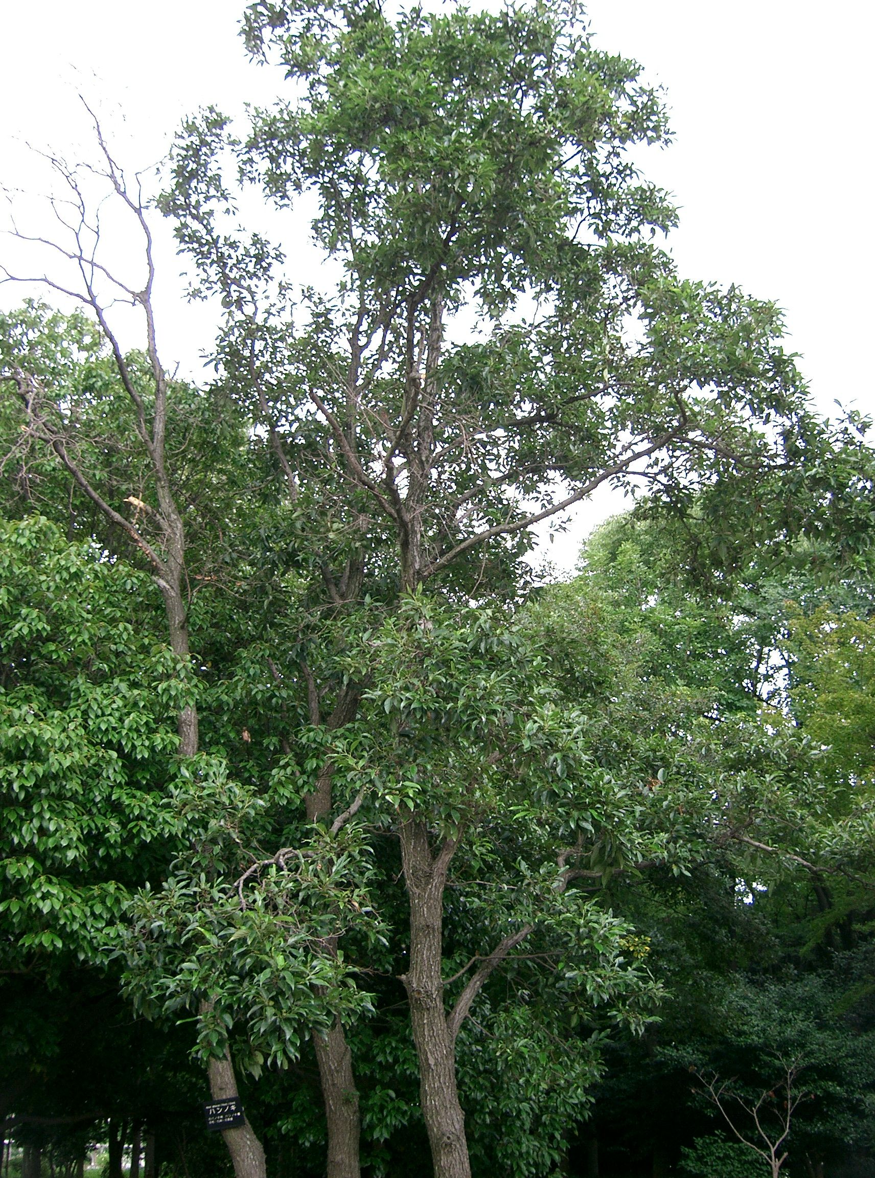 Scientific name Alnus japonica